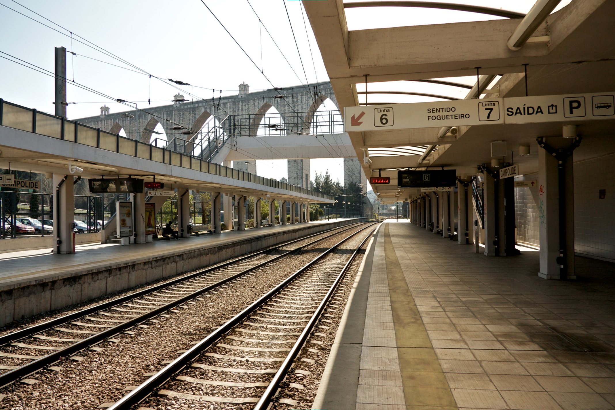 Tipo: EC Estação de Concentração Local: Campolide [Linha de Cintura, PK 2] Data e hora: 24 de Fevereiro de 2012 [14h09]